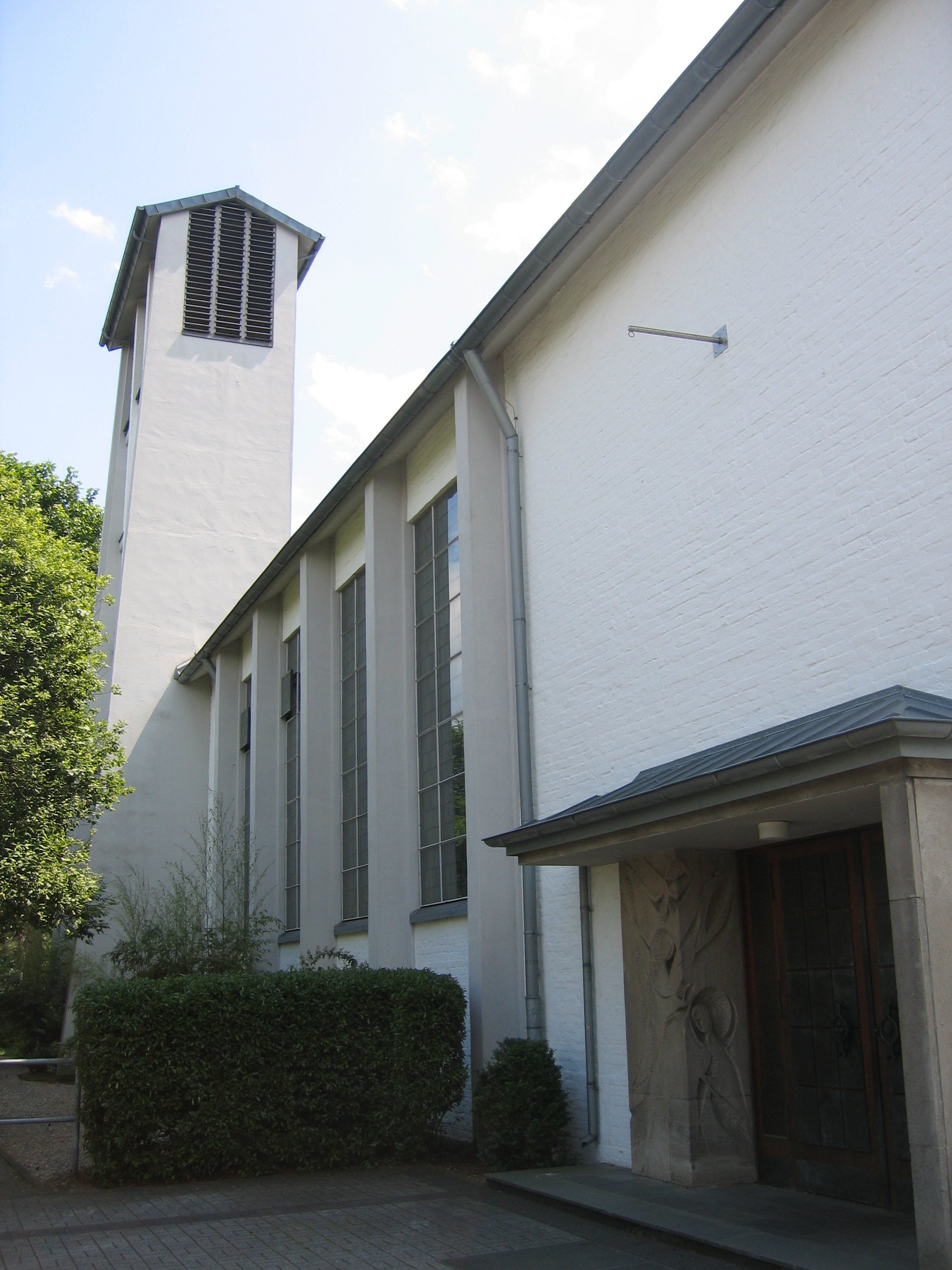 Kirche St. Mariä Himmelfahrt in Köln-Grengel